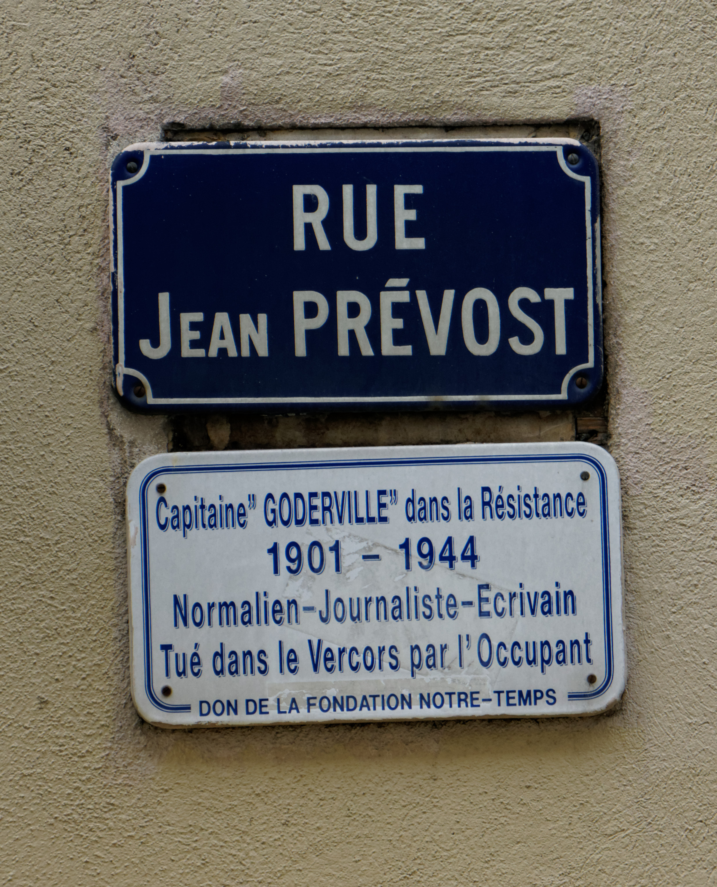 Plaque de la rue Jean Prévost à Grenoble. Inscription: capitaine "Goderville" dans la Résistance. 1091-1944. Normalien - Journaliste - Ecrivain. Tué dans le Vercors par l'Occupant